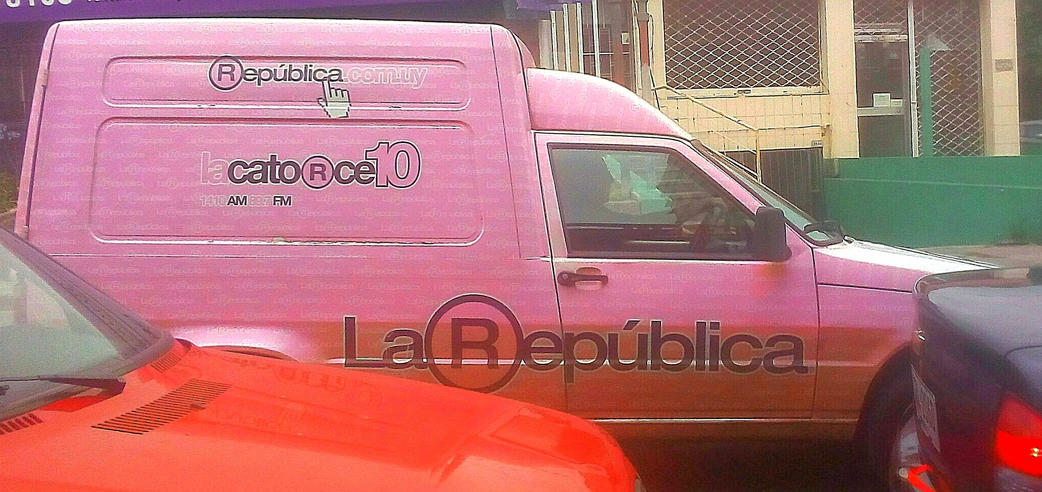 Vehículo utilizado por el diario uruguayo La República.